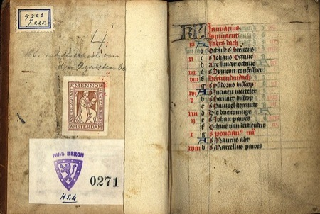 Afbeelding Middeleeuws getijdenboek (handschrift) met teksten van Geert Grote (1340 -1384)